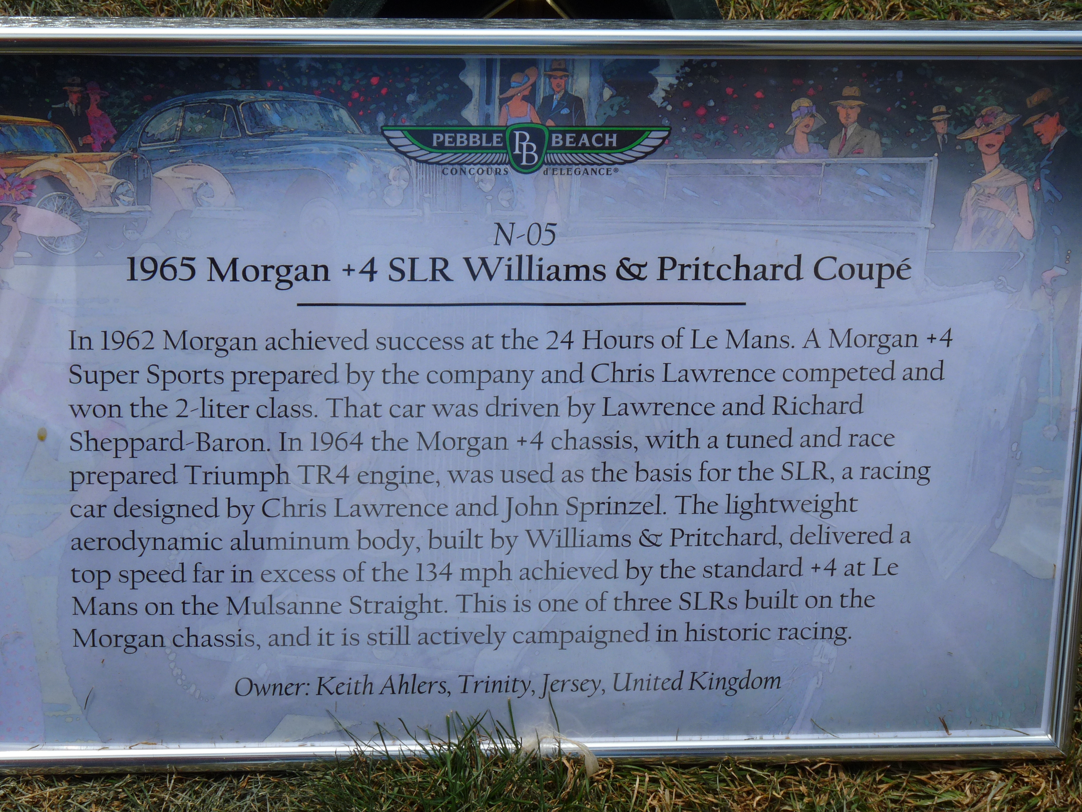 Sign describing car